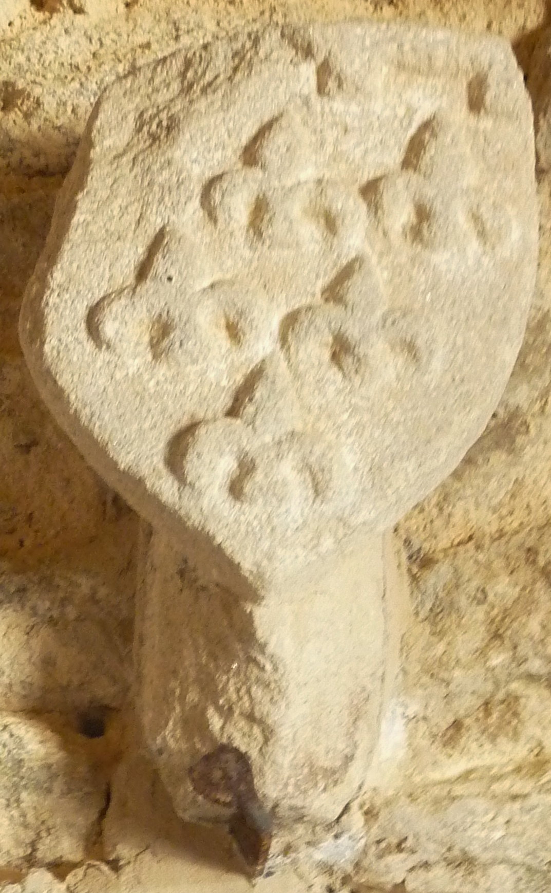 Blason de la famille de Marhallac'h (Maison du sacristain, chapelle de Languivoa à Plonéour-Lanvern)